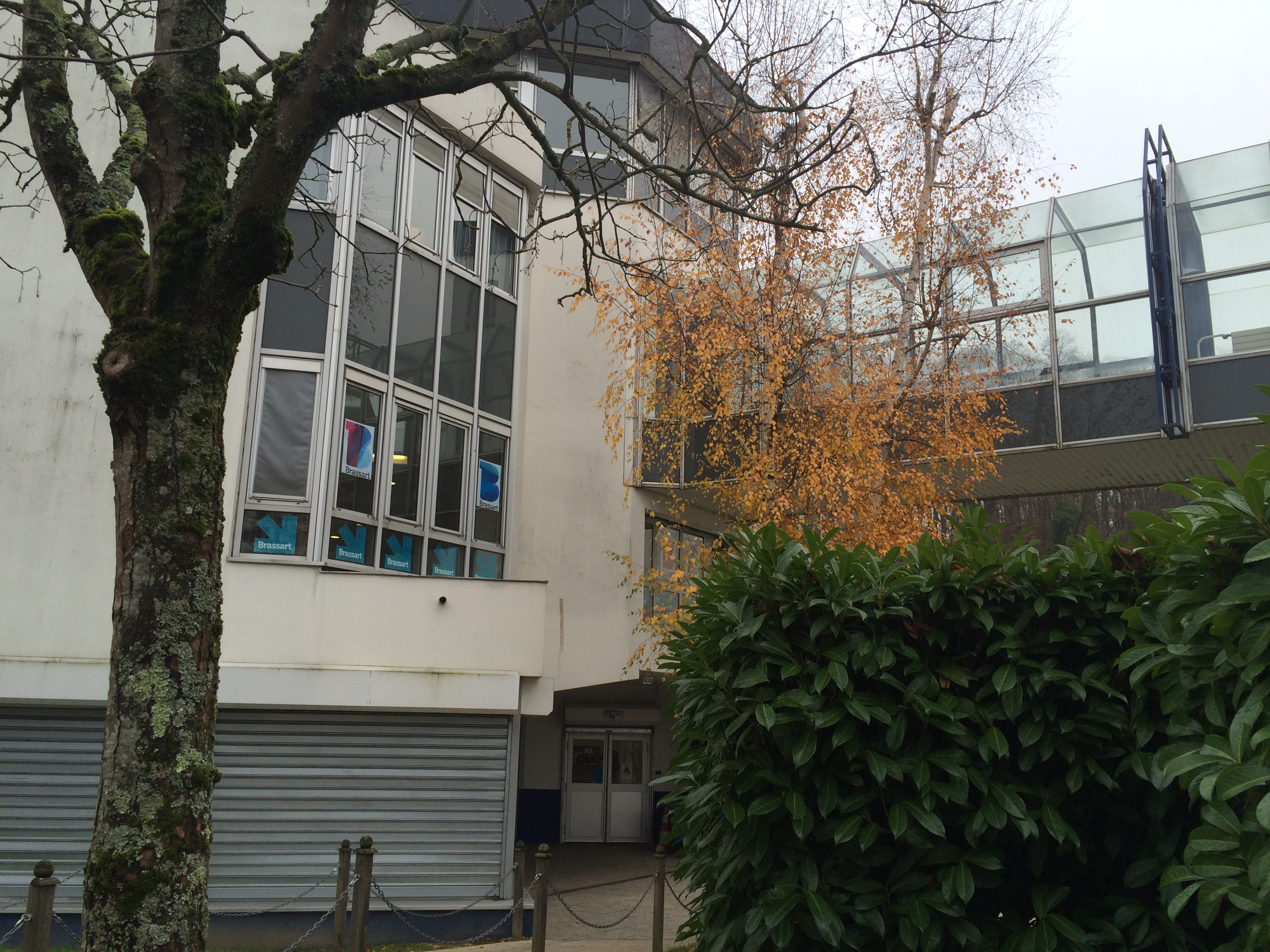 TOURS : Nouvelle école Brassart flanc nord)